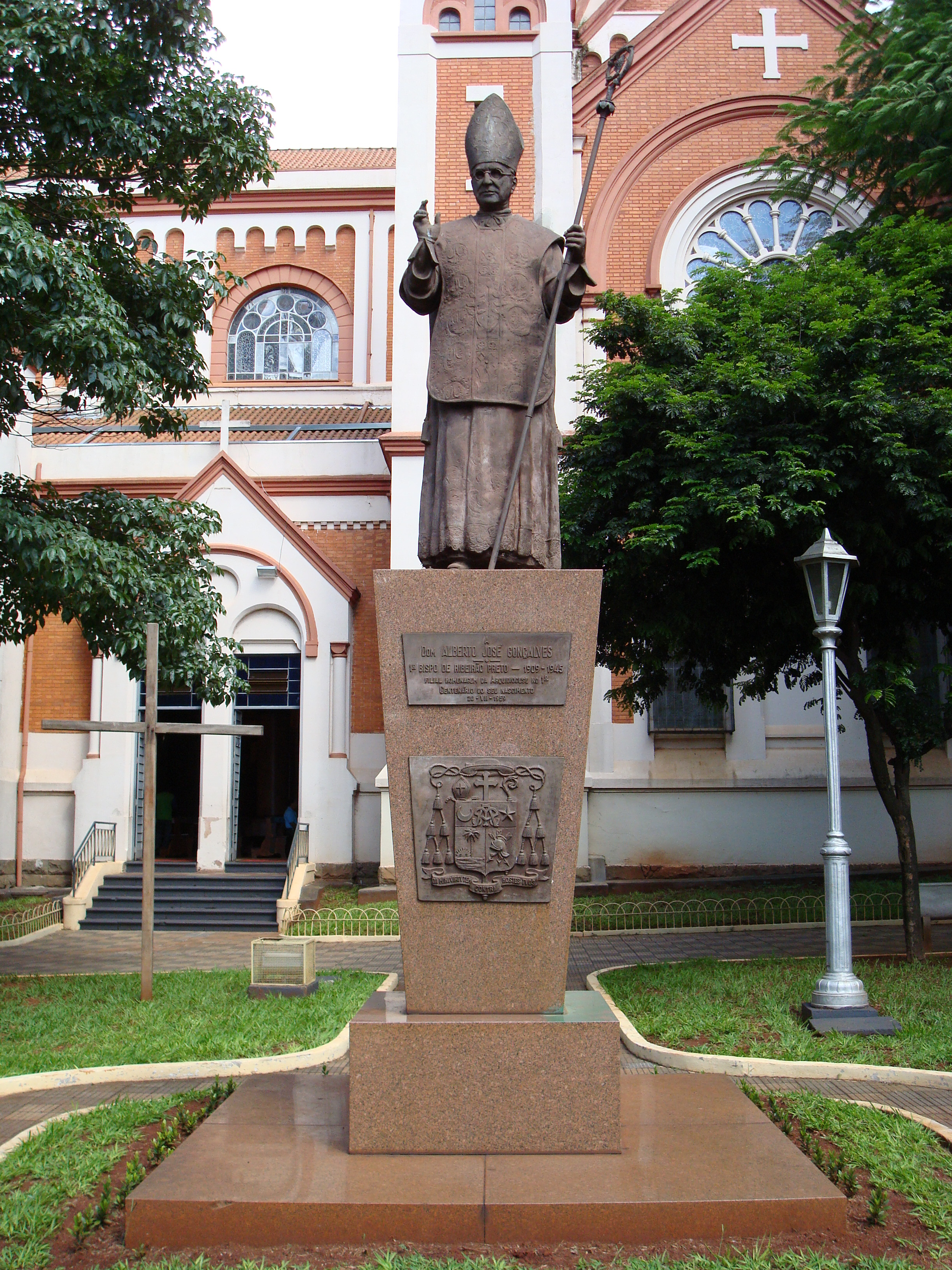 Homenagem a Dom Alberto José Gonçalves - 1º Bispo de Ribeirão Preto